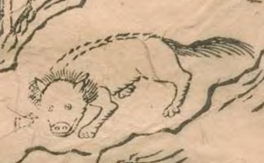 粵語: 出自 山海經十八卷附圖